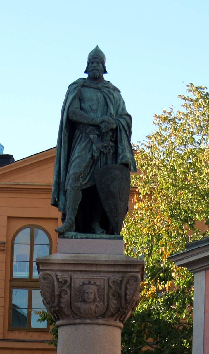 Birger jarl, Riddarholmen, Stockholm, Sweden (a fantasy image from recent times)